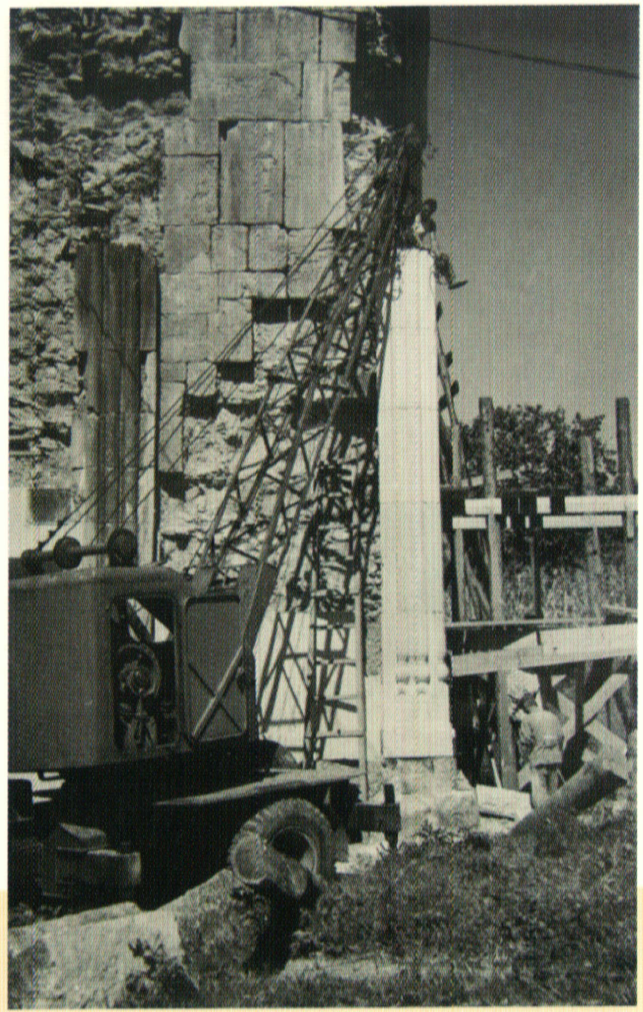 ბაგრატის ტაძრის რეკონსტრუქცია 1950-იან წლებში